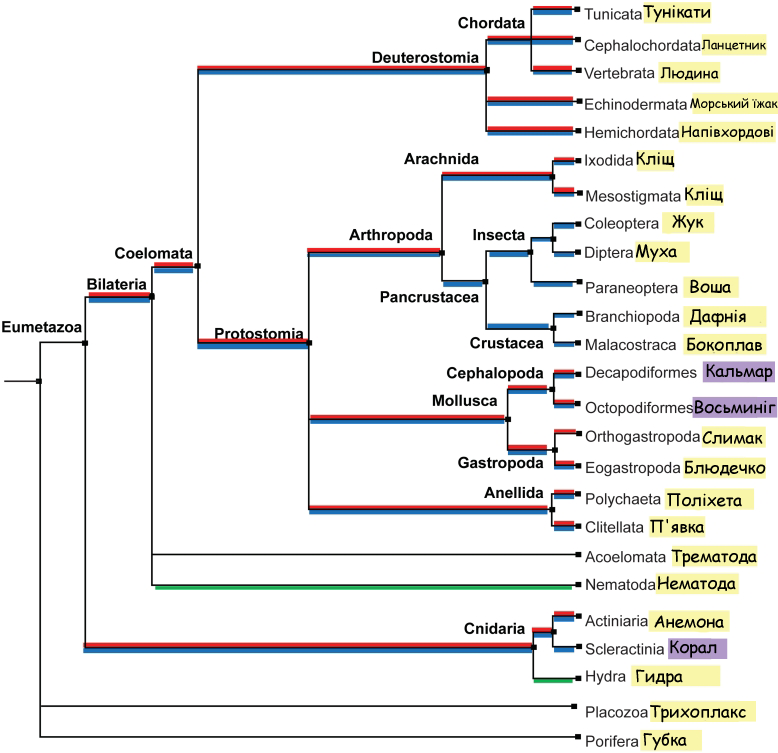 Наявність генів ADAR у тварин. Червоним позначений ADAR1, синім - ADAR2